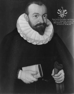 Johann Valentin Neuffer, Gemälde in der Professorengalerie Tübingen